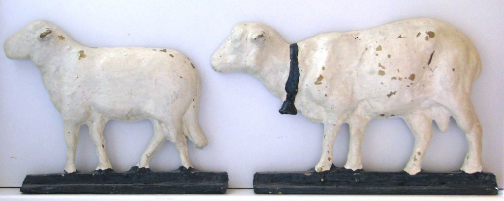 Bronzen replica’s van het lammetje en schaapje uit het Schapenkamp in Hilversum.